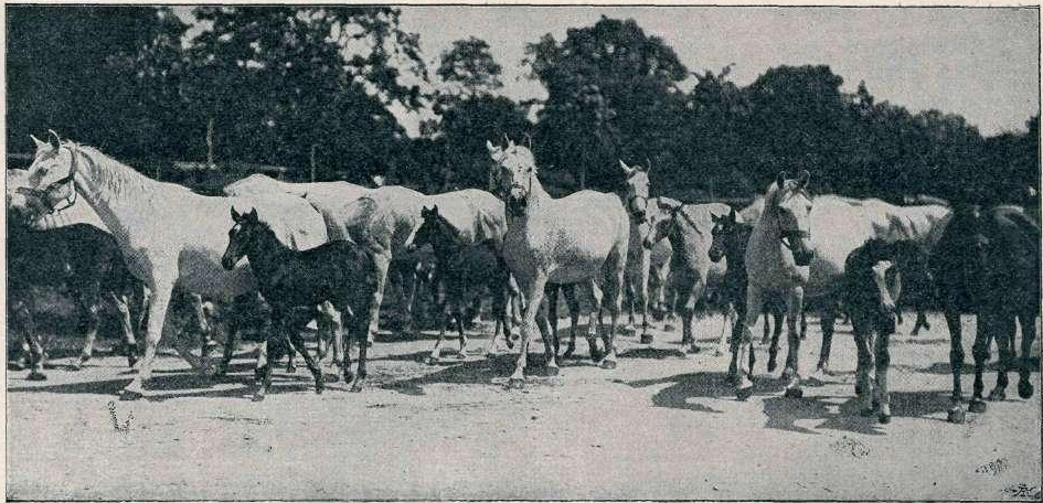 Iz cesarske konjušnice v Lipici na Krasu - na pašo.